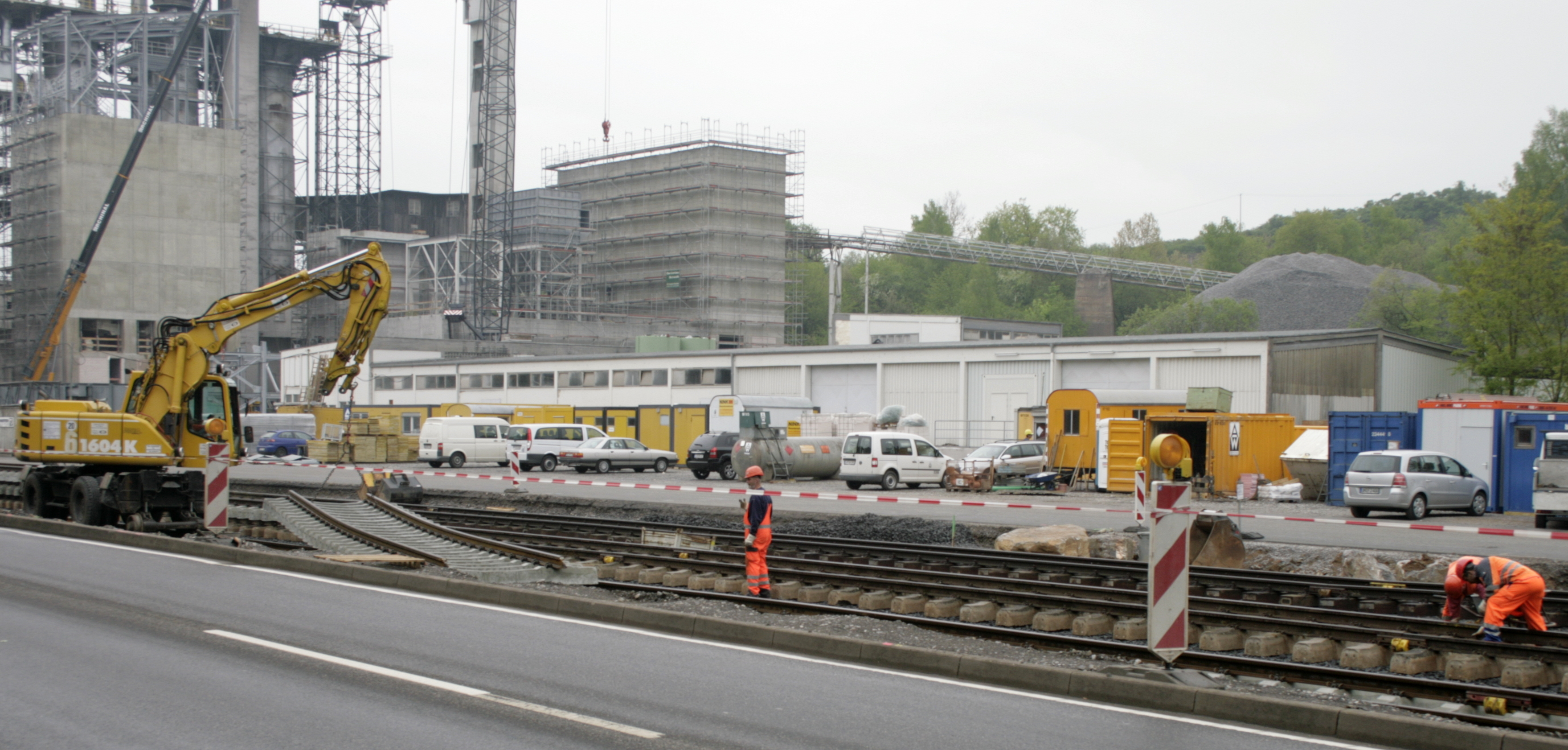 Arbeiten zur Reaktivierung der Kerkerbachbahn am Kalkwerk in Runkel-Steeden, Deutschland